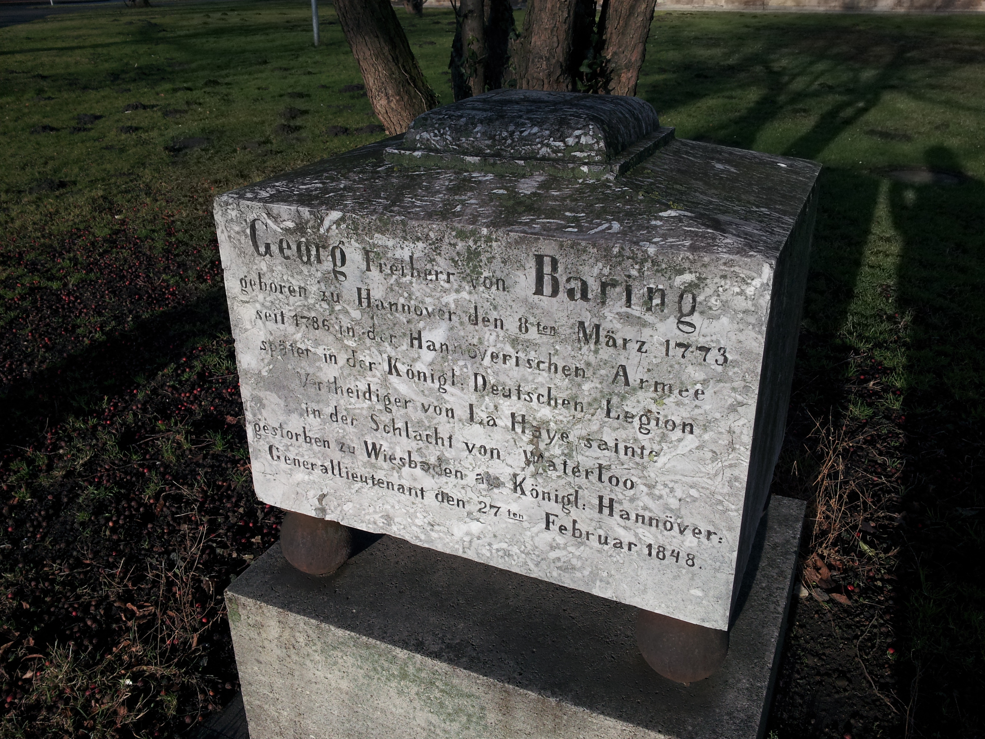 Gedenkstein "Georg Freiherr von Baring" in Hannover, 2012